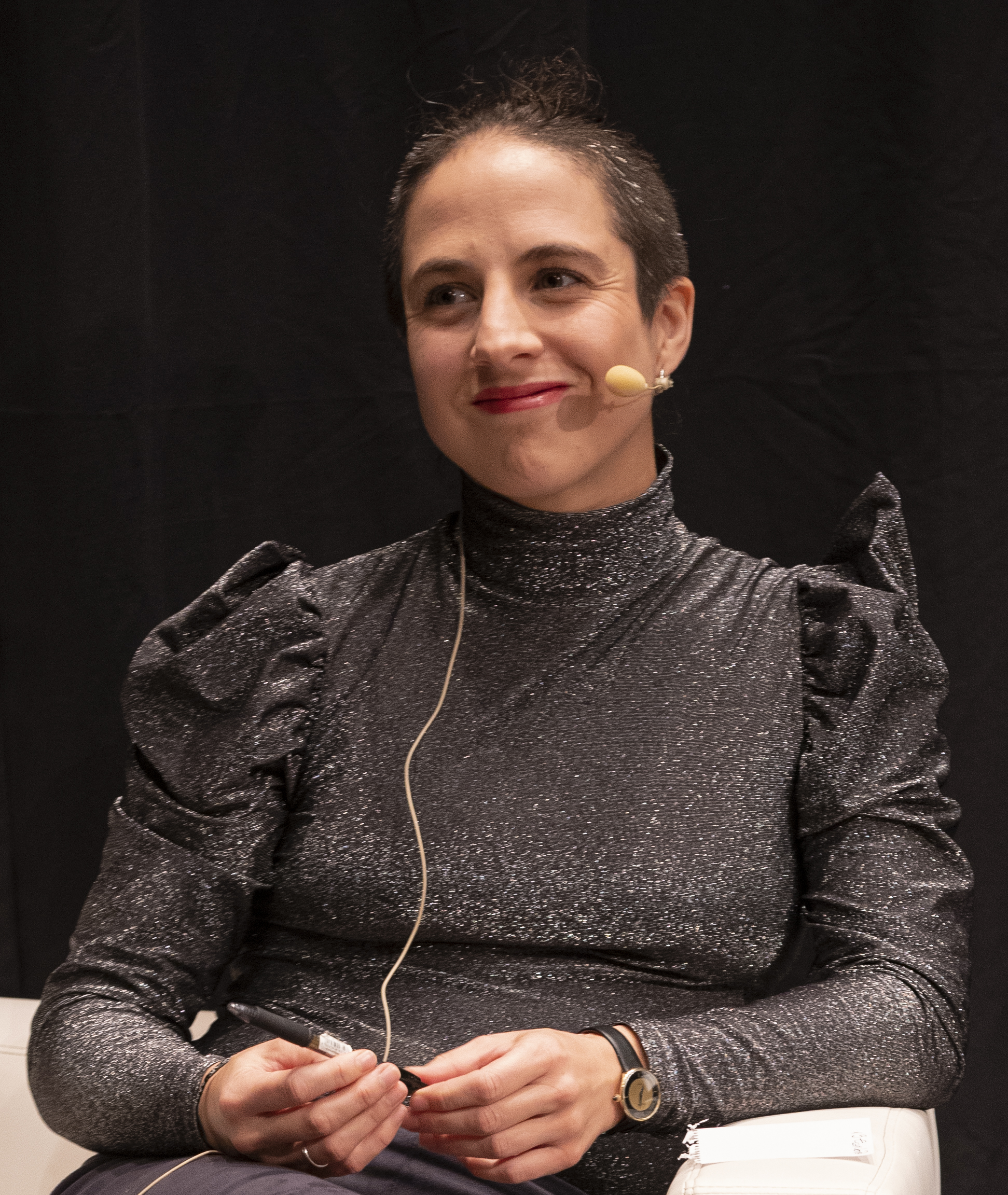 Koldo Mitxelena 19:00 Paul B. Preciado & Cristina Morales Moderatzailea: Ohiane Garmendia Antolatzailea: Donostia Kultura Kolaboratzaileak: Koldo Mitxelena & Feministaldia Argazkilaria: Iñaki Rubio